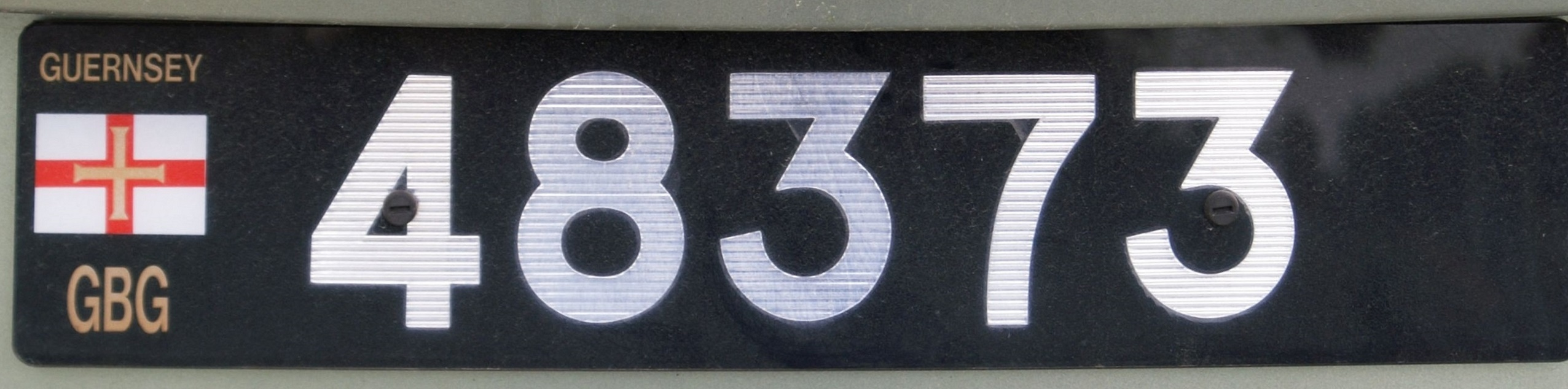 Guernsey kentekenplaat oud